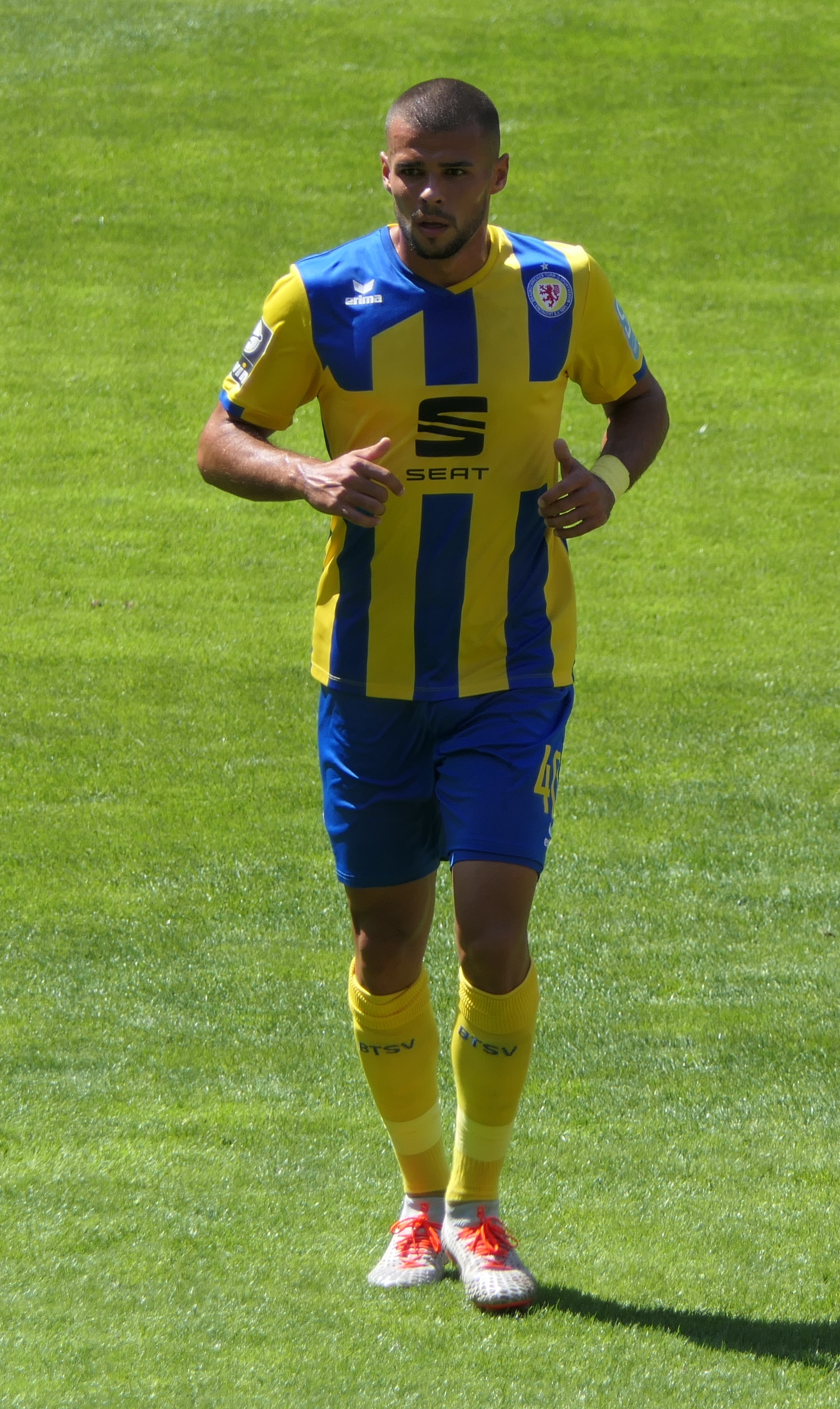 Der Fussballprofi Robin Ziegele im Trikot von Eintracht Braunschweig beim Auswärtsspiel gegen den 1.FC Kaiserslautern am 18.08.2019.